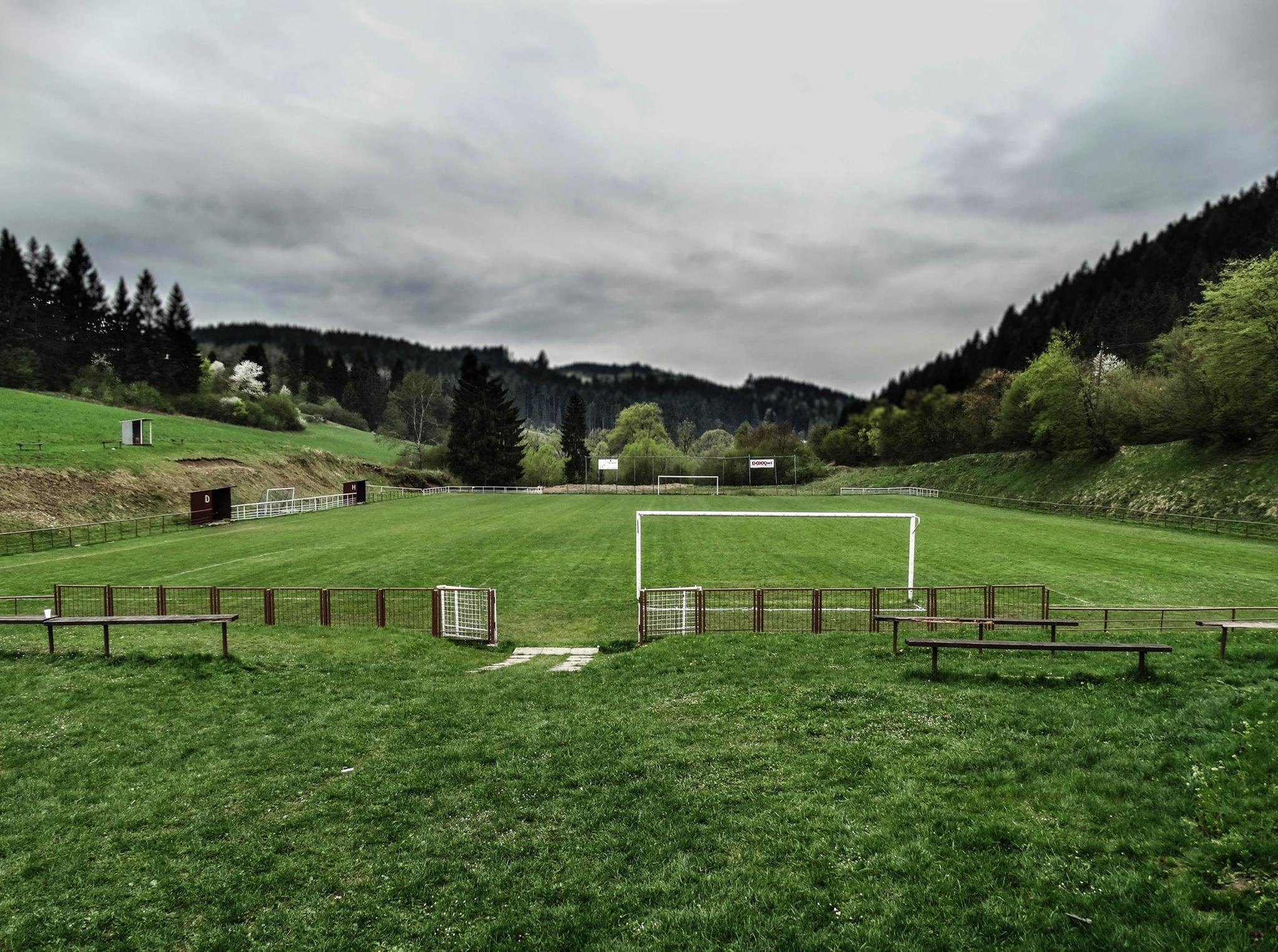 Štadión FK